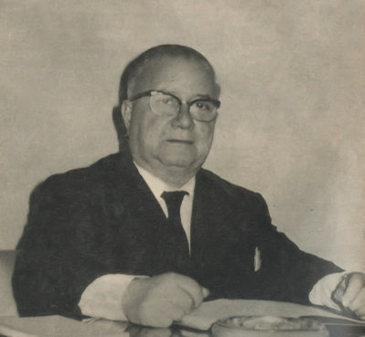 Juan Queraltó (1974), político argentino (1912-1987), fundador y presidente de la Alianza Libertadora Nacionalista.